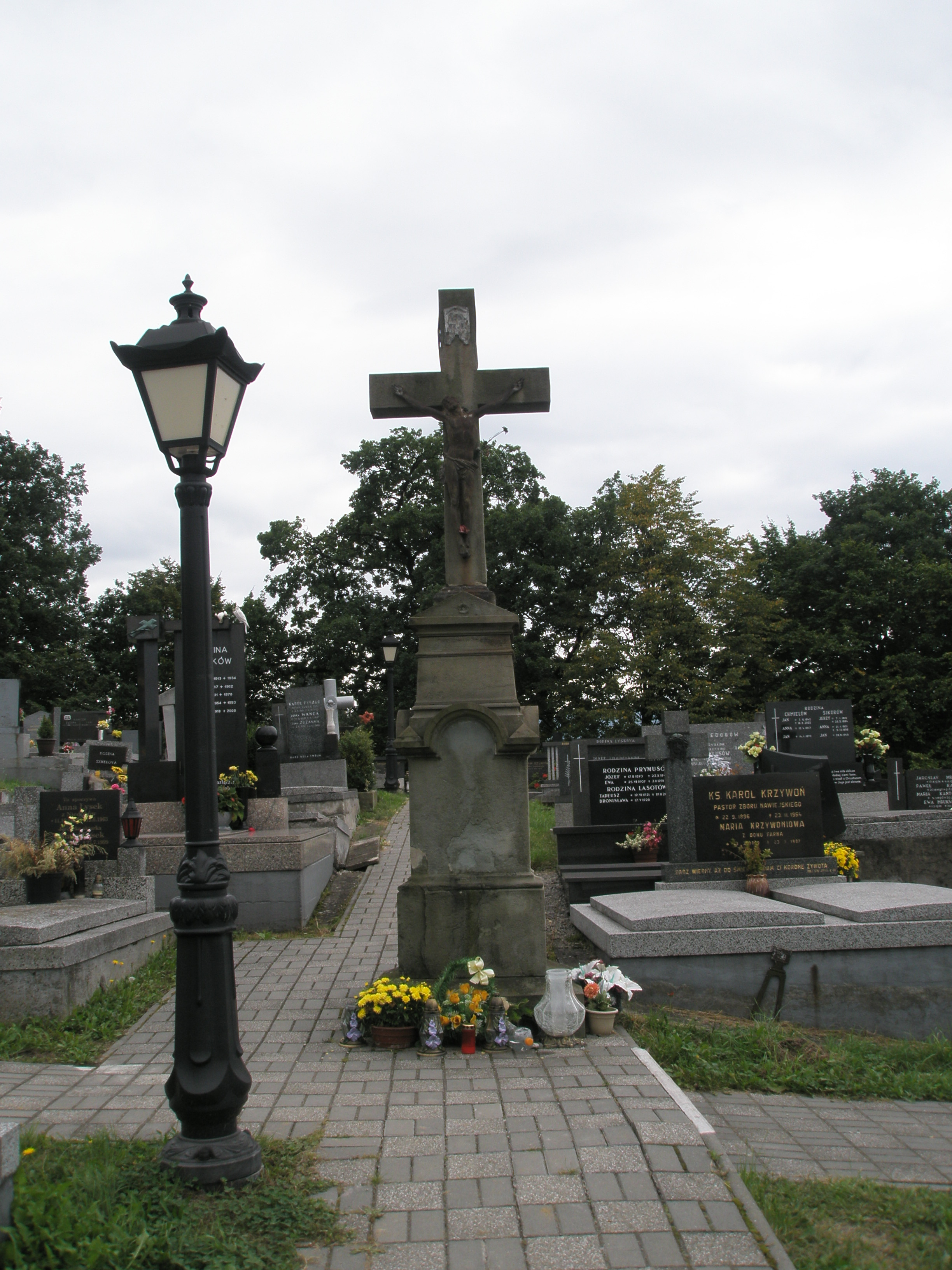 The Lutheran Cemetery in Návsí, Czech Republic